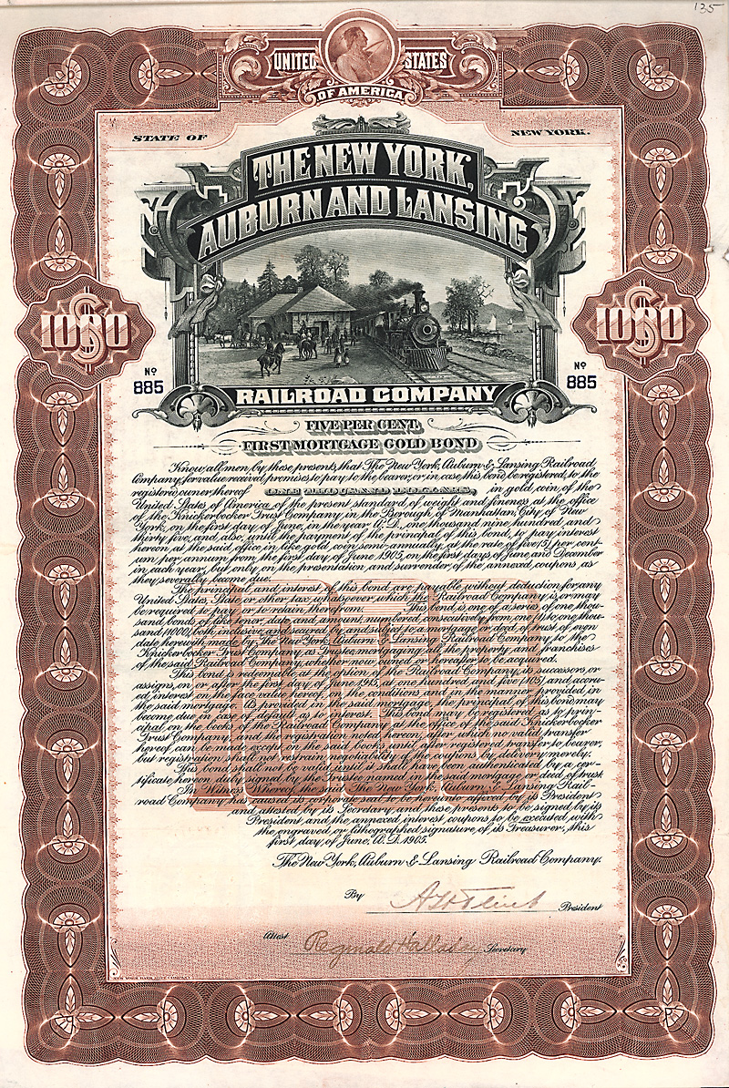 Bond of the New York, Auburn and Lansing Railroad from the 1st June 1905